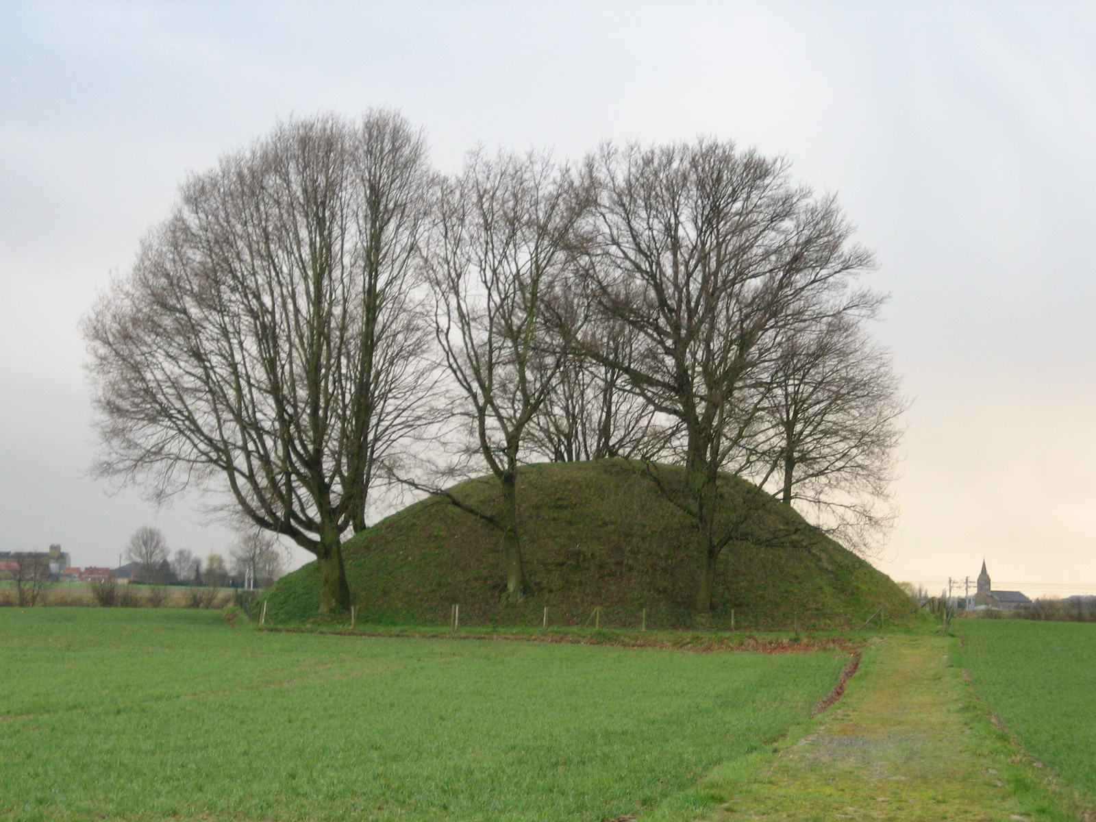 Avernassentombe, en Tumulus laanscht d'E40.